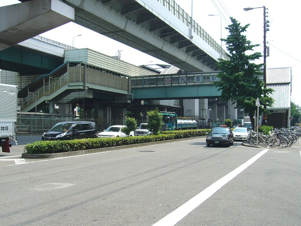 大阪市営地下鉄・九条駅